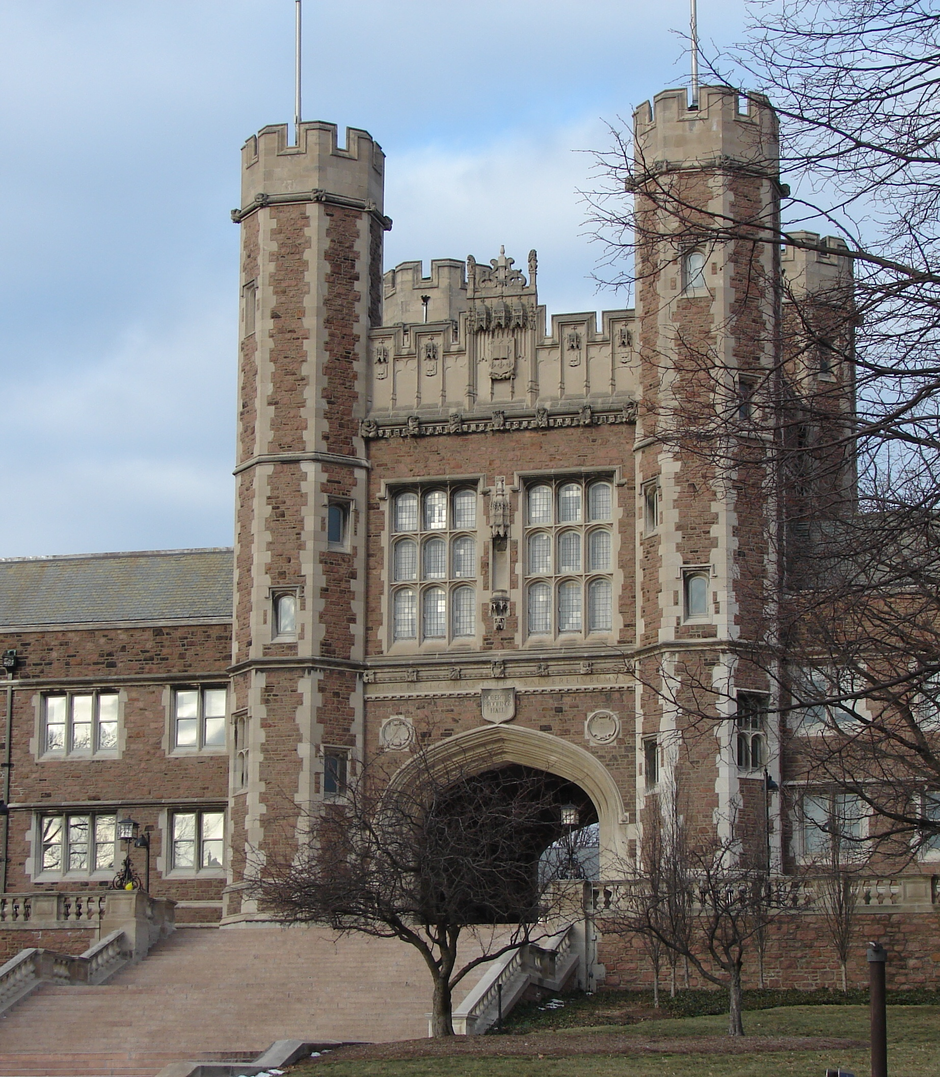 Brookings Hall long angle